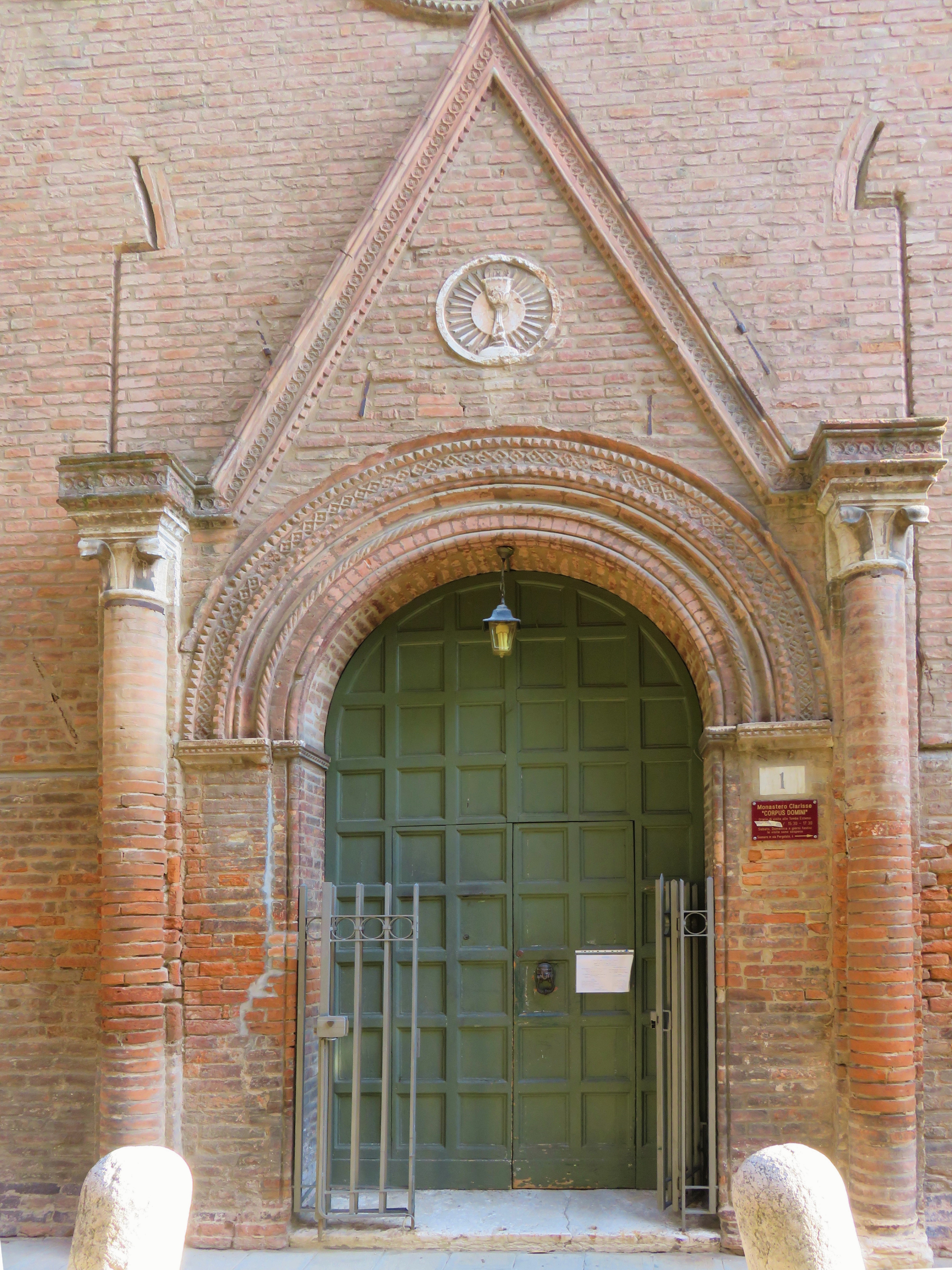 Portale della chiesa in via Campofranco